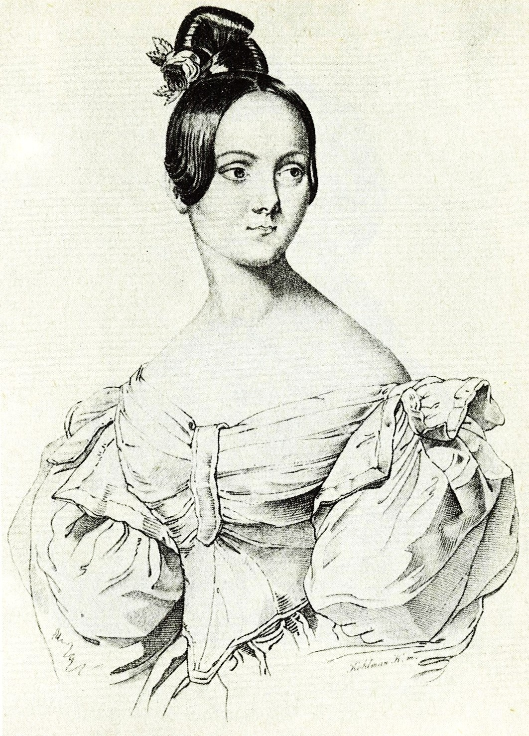 Lendvayné Hivatal Anikó Marastoni Jakab rajza, Kohlmann Károly rézmetszete, 1836. MSZI ltsz. 52.585.